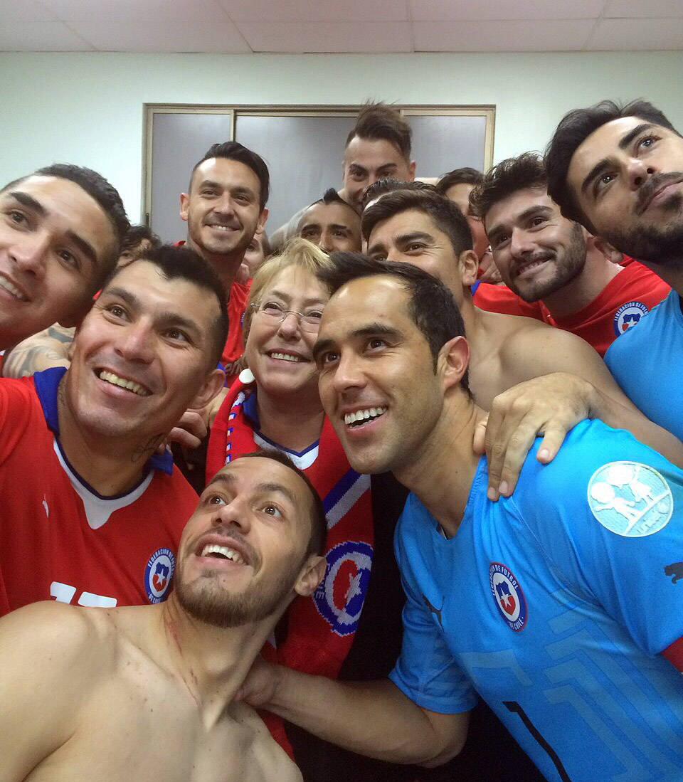 Gobierno de Chile